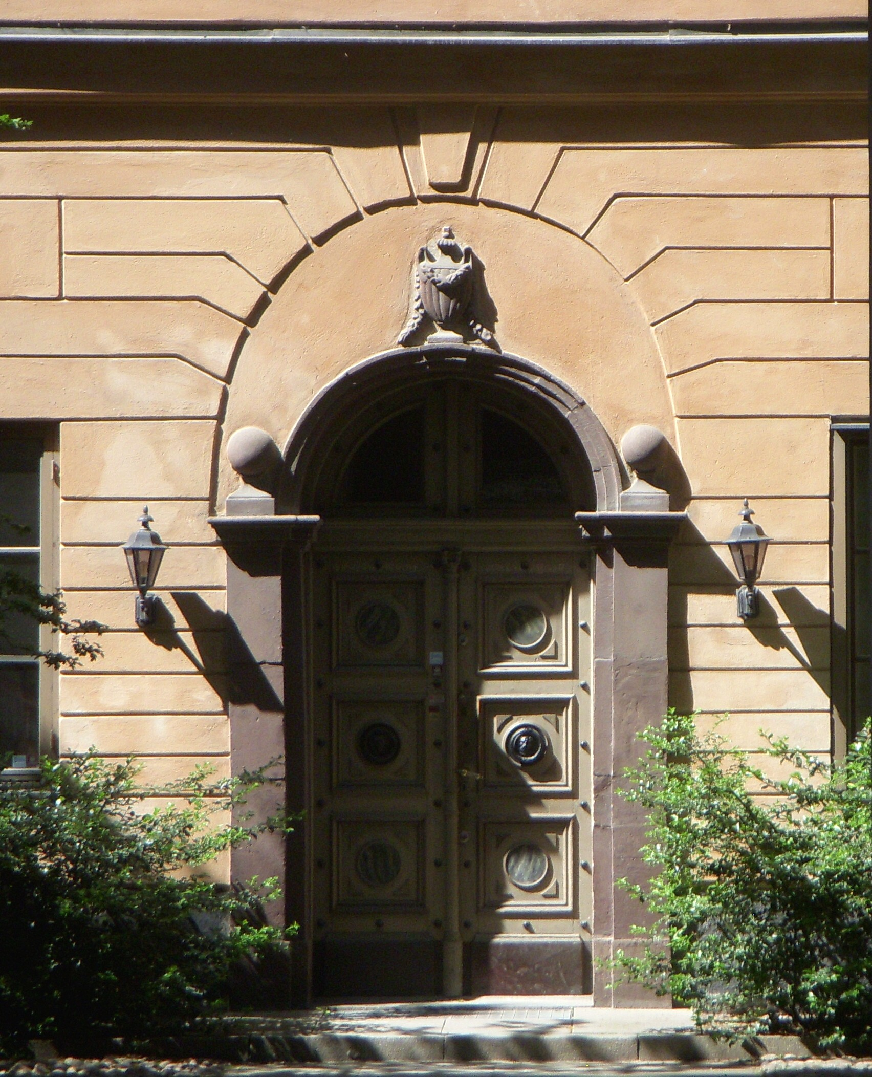 Paulis malmgård originalport från 1600-talet